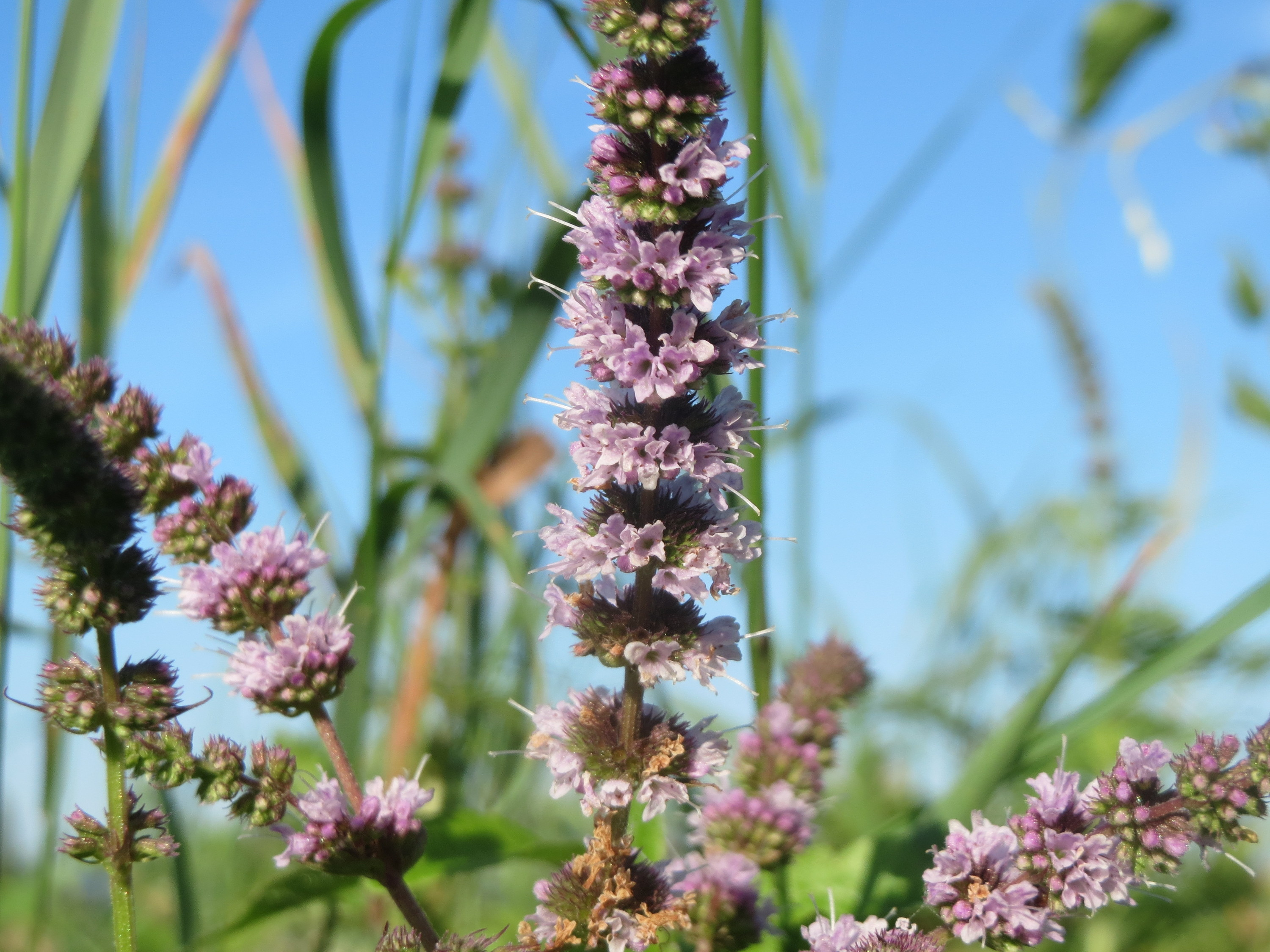 Grüne Minze (Mentha spicata) bei Hockenheim